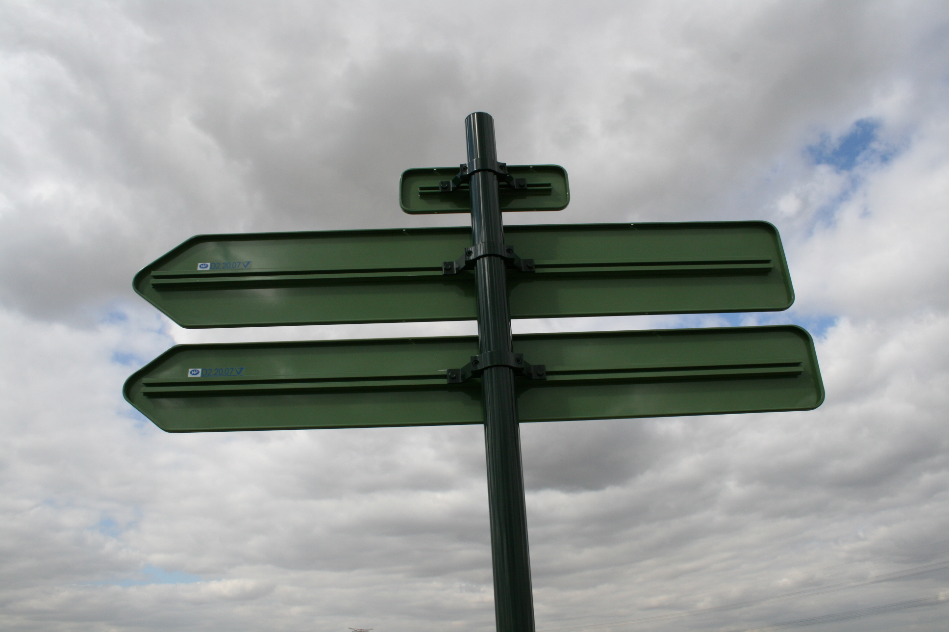 Panneau de signalisation de catégorie SD2 (France)